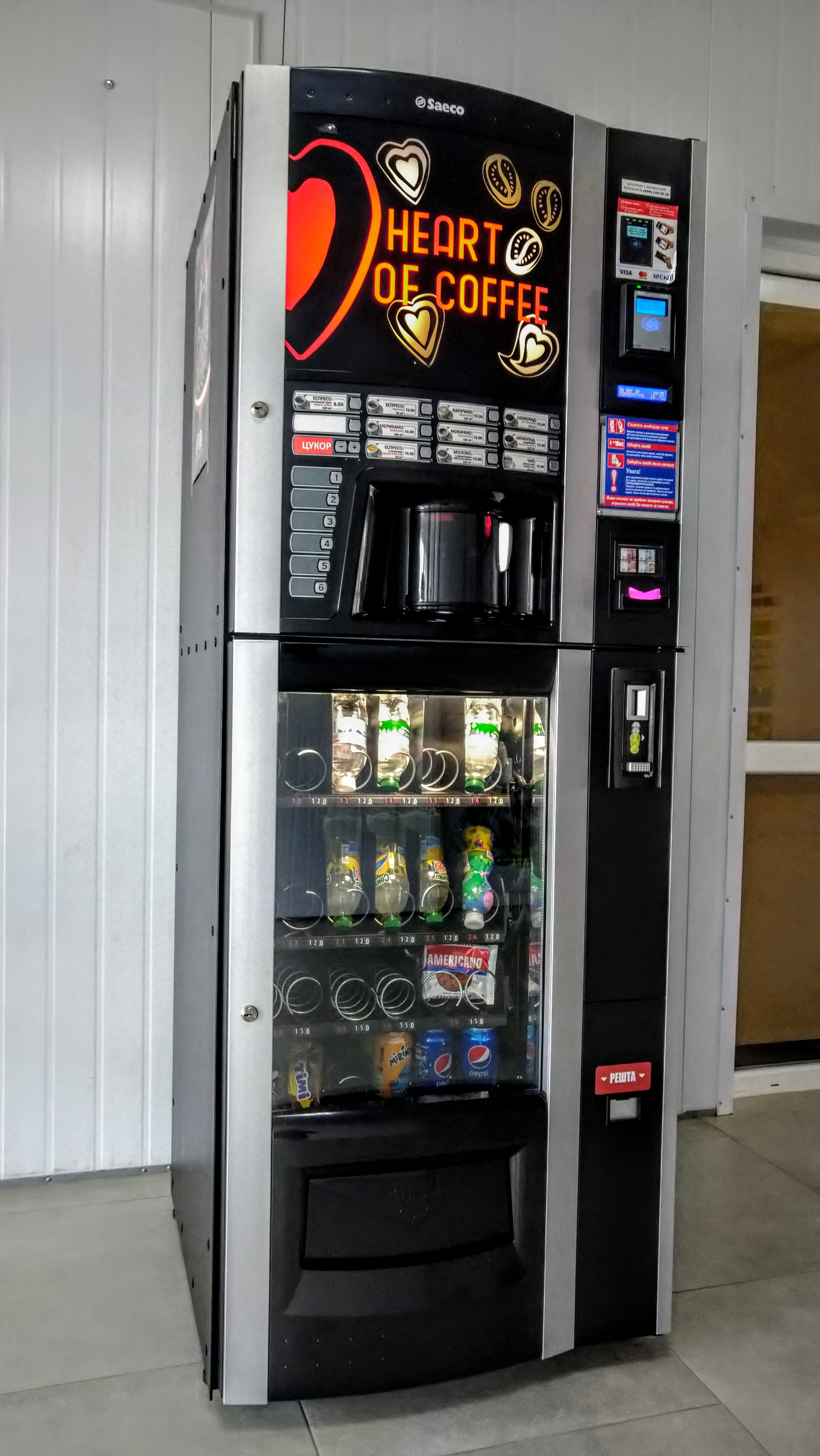 Сучасний вендінговий автомат з комбінацією кавомату та автомату з снеками